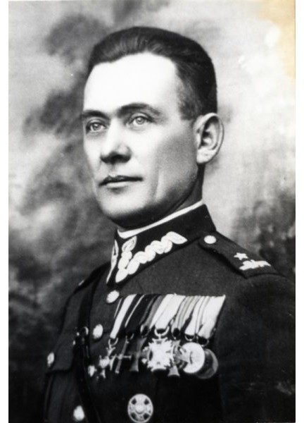 Jan Korkiewicz (ur. 1898, zm. 1940) - podpułkownik piechoty Wojska Polskiego, kawaler Orderu Virtuti Militari, ofiara zbrodni katyńskiej.